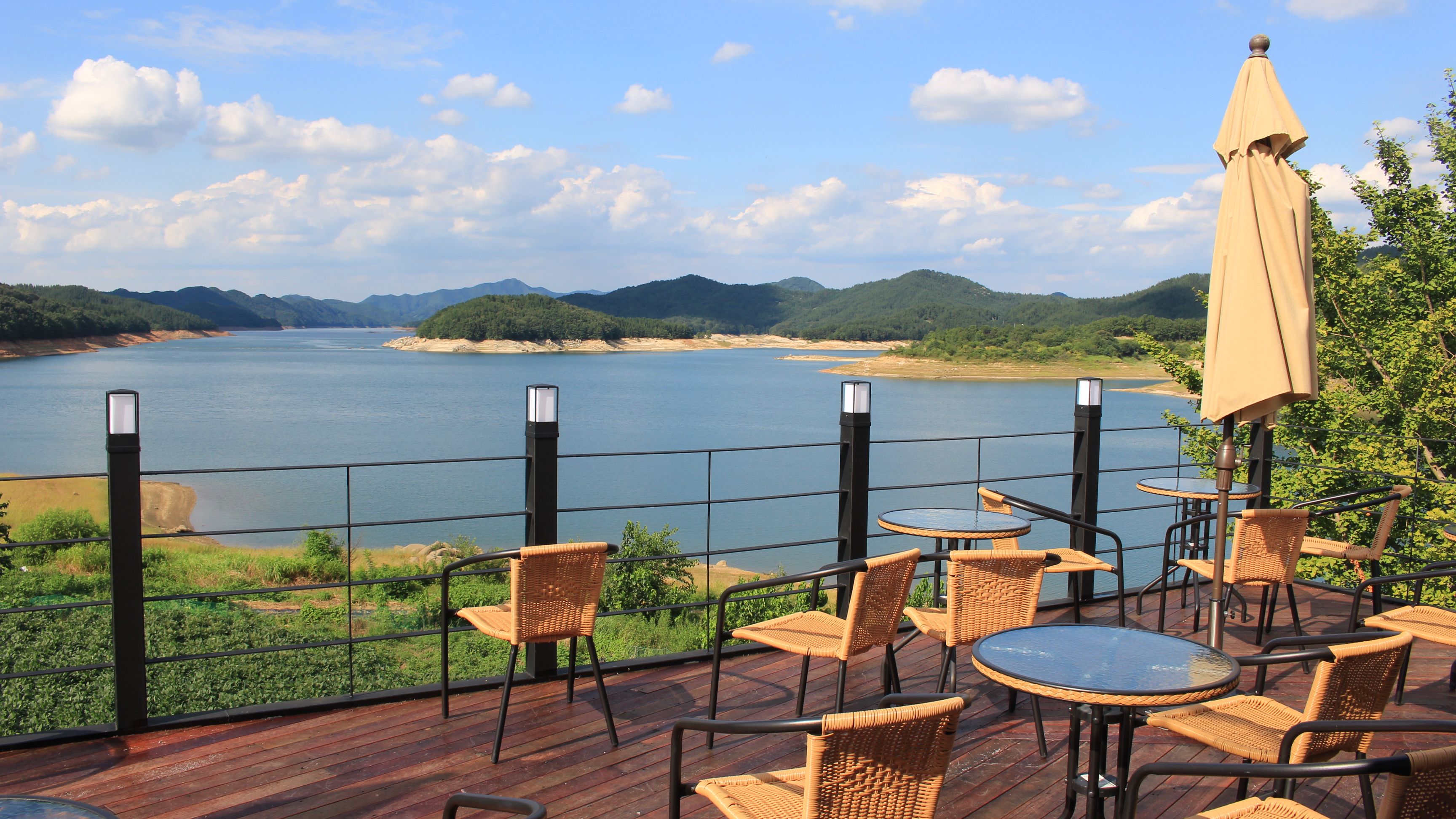 대청호오백리길 5구간_6